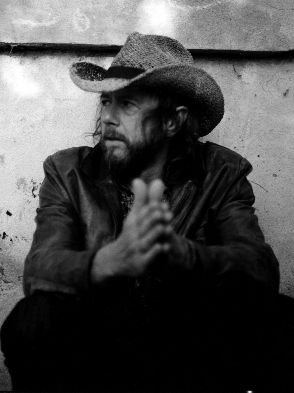 Uli M Schueppel